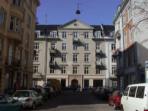 Westend, 1661 Vesterbro, København. Foto af Lars Bregendahl Bro.